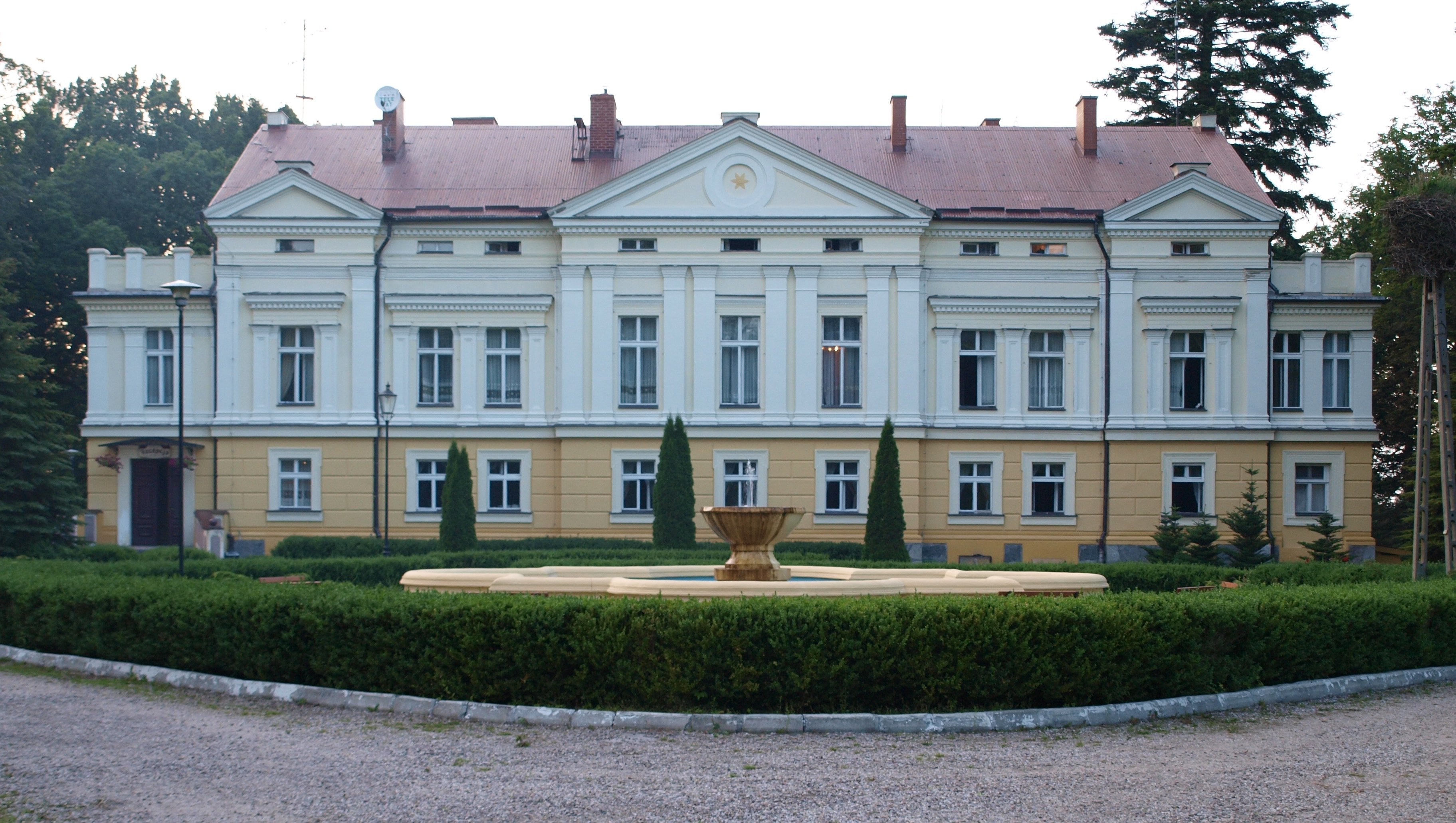 Pałac w Sasinie